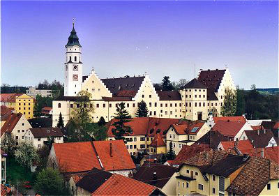 Fuggerschloß